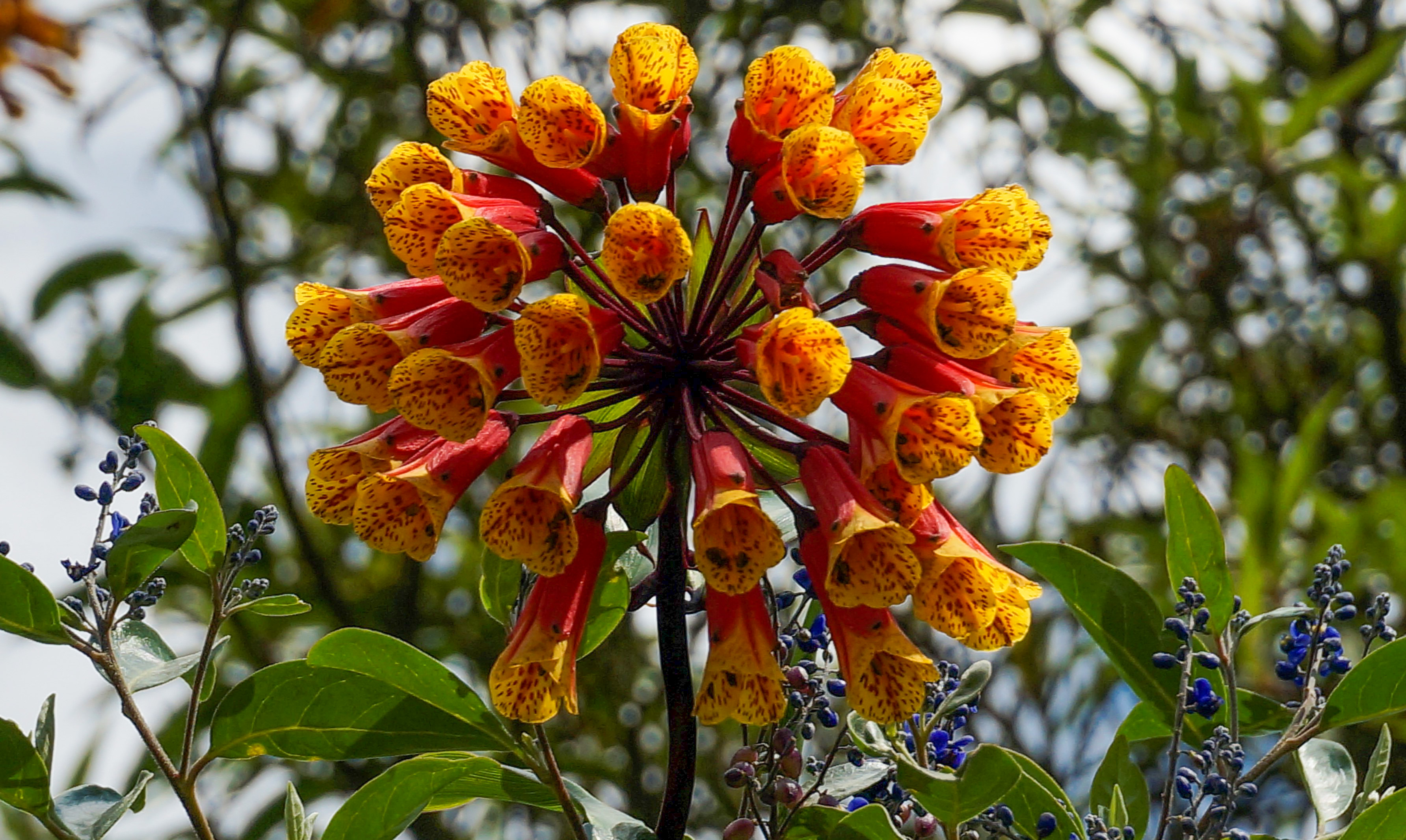 Bomarea glaucescens en la zona de Baños de agua santa, Tungurahua, Ecuador